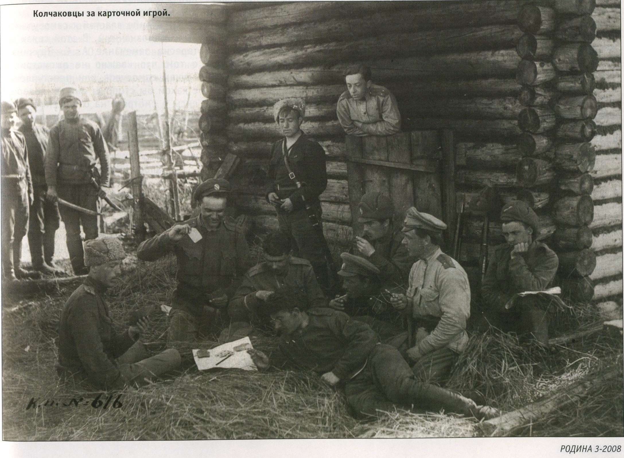 Колчаковцы за карточной игрой